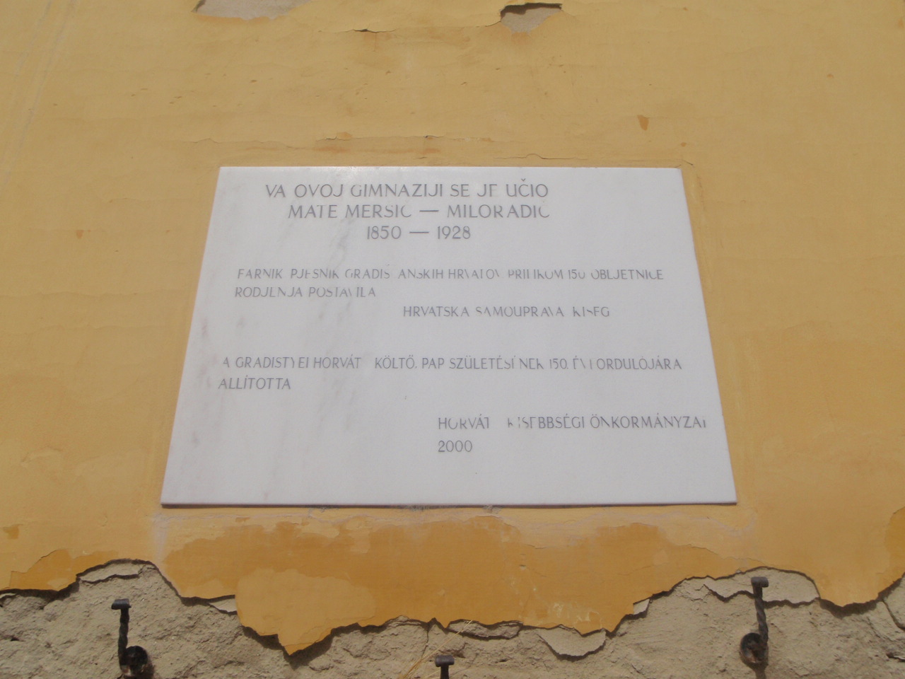 Mate Mersic Miloradic Gedenktafel in Güns